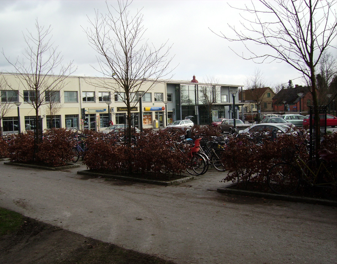 Västra stationstorget, Lund, Sweden